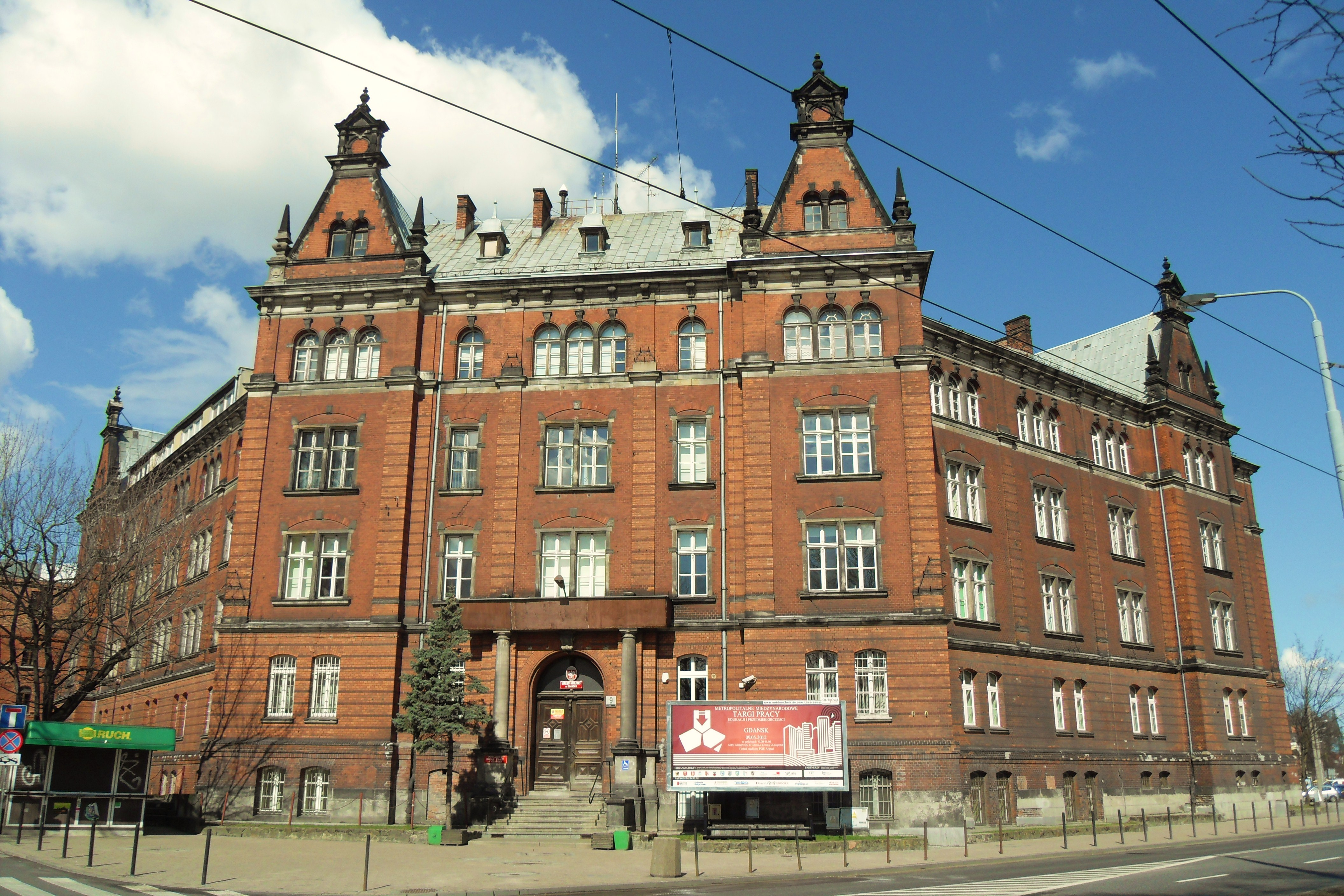 Gdańsk Śródmieście, ul. 3-go Maja 9. Dawna Szkoła Wojenna (Kriegsschule).